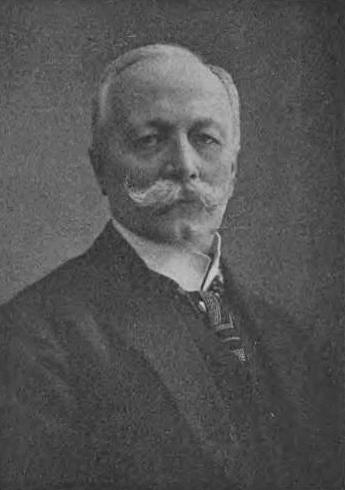 Michał Garapich